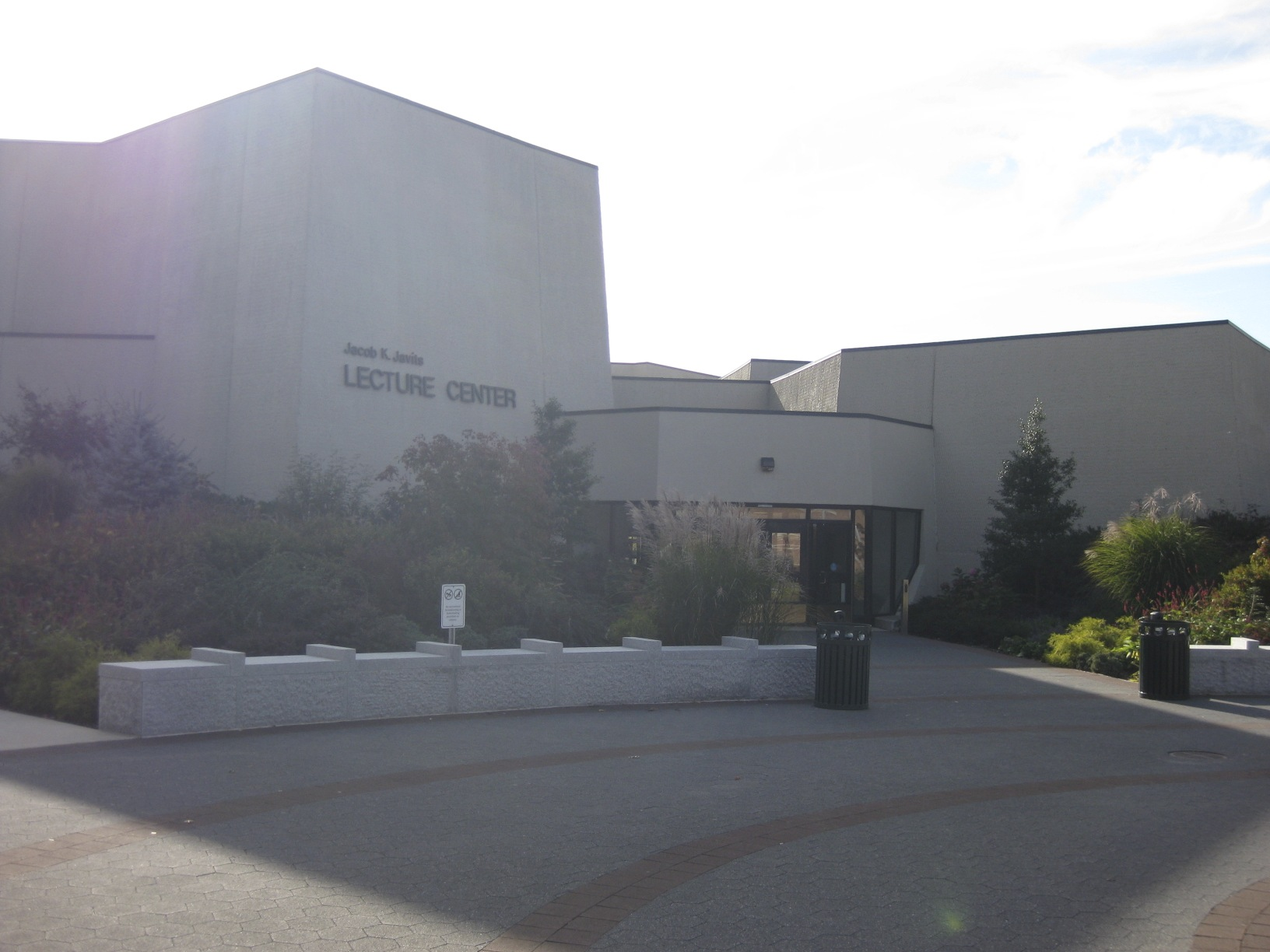 Javits Lecture Center